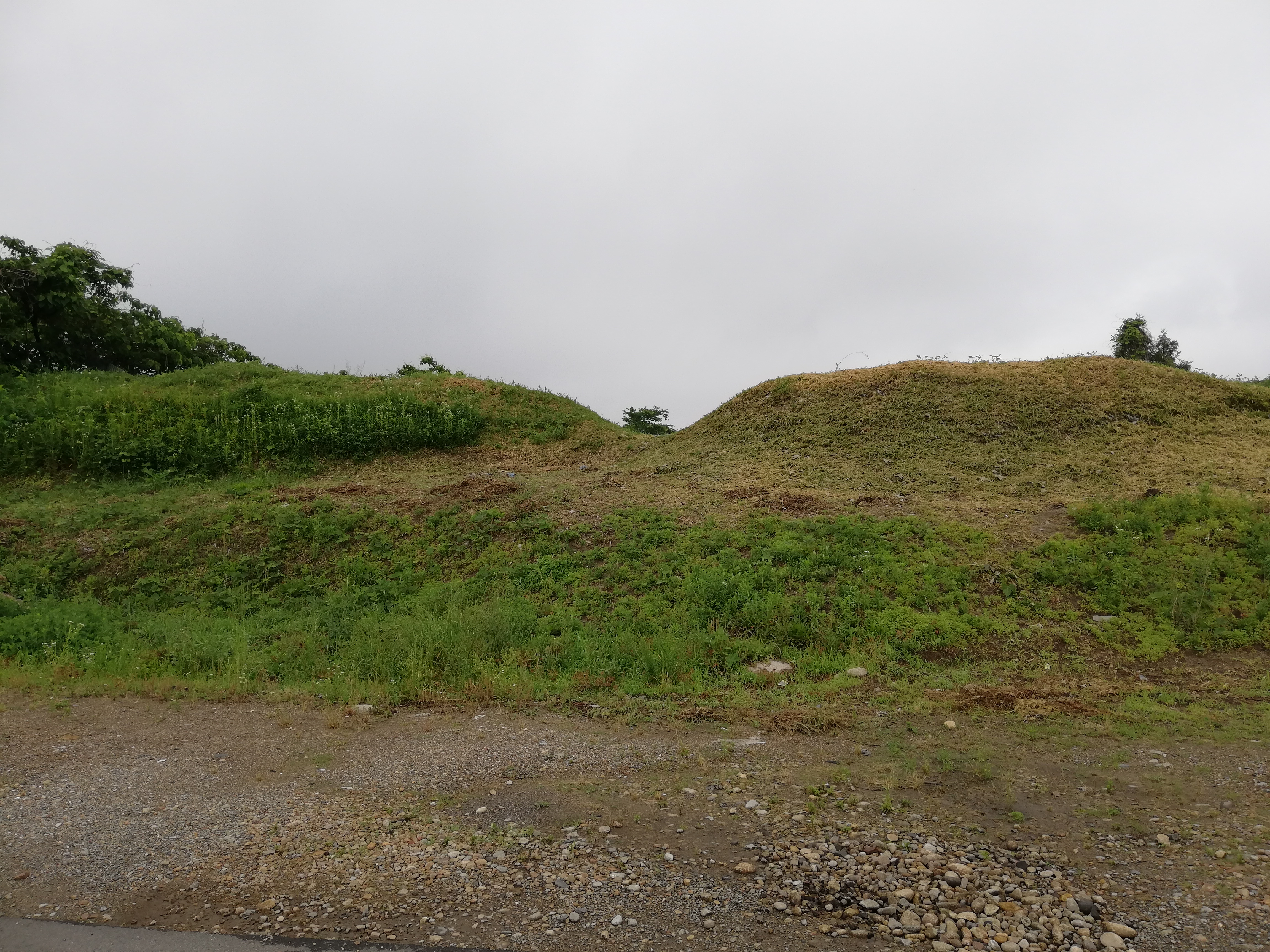 岐阜県各務原市にある大牧4号墳。